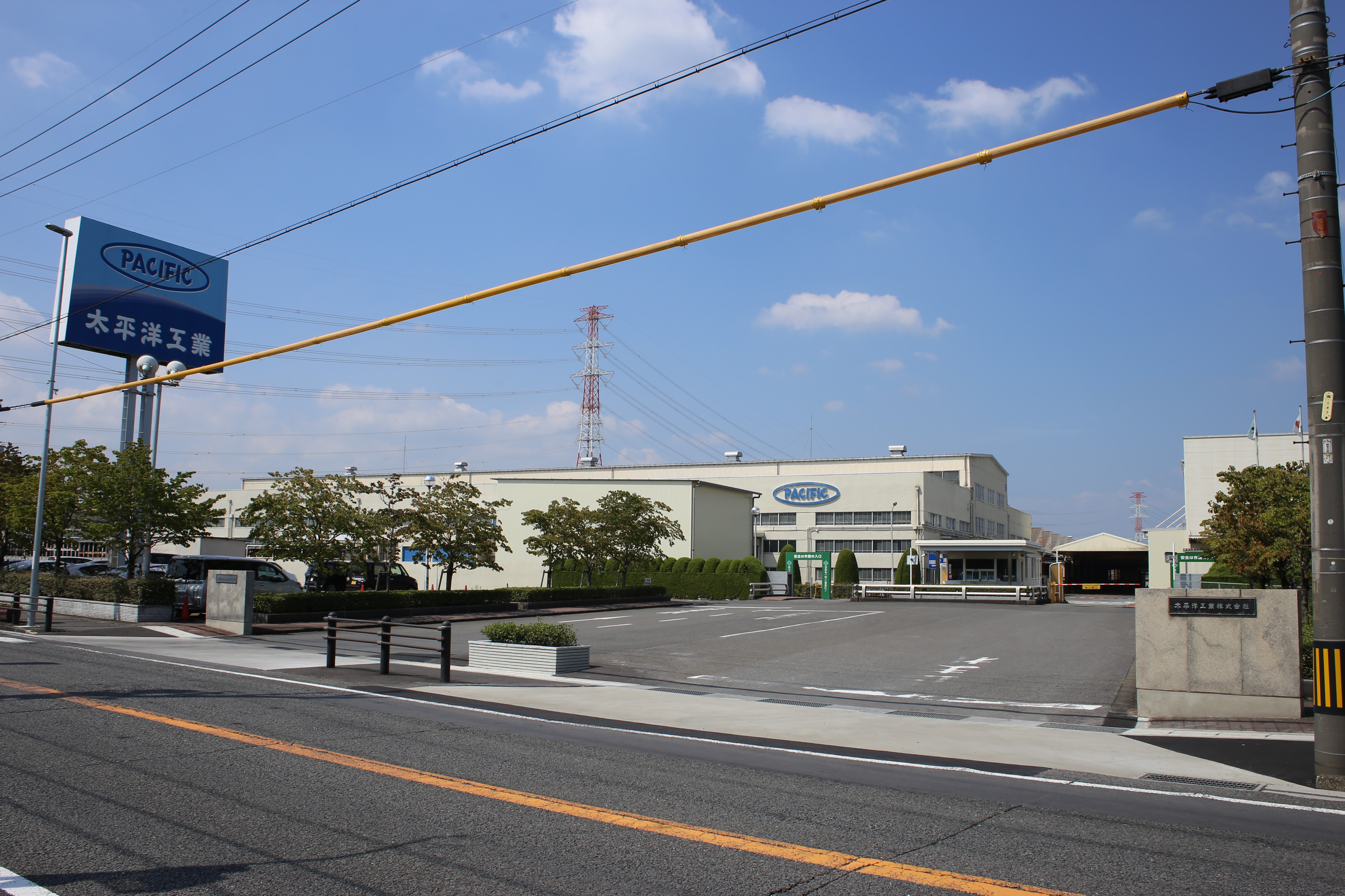 岐阜県大垣市久徳町の太平洋工業本社